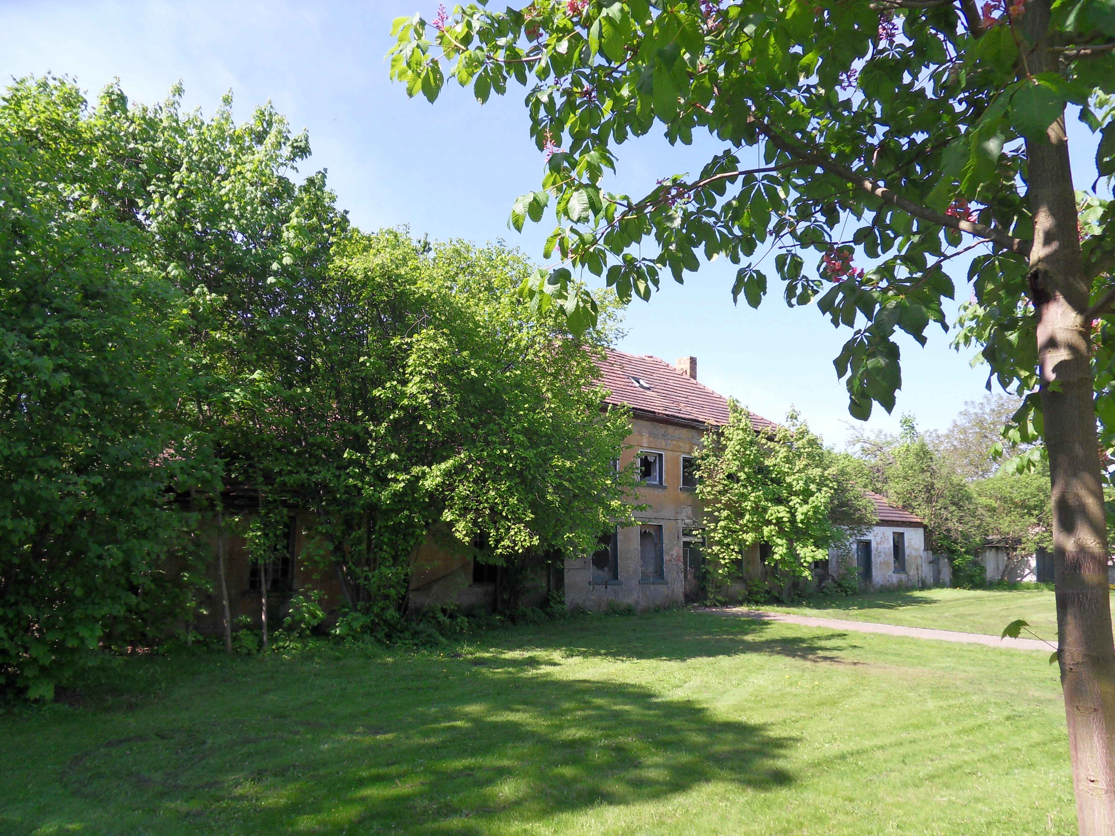 Denkmalgeschützte alte Försterei im Schlosspark in Lauchhammer-West